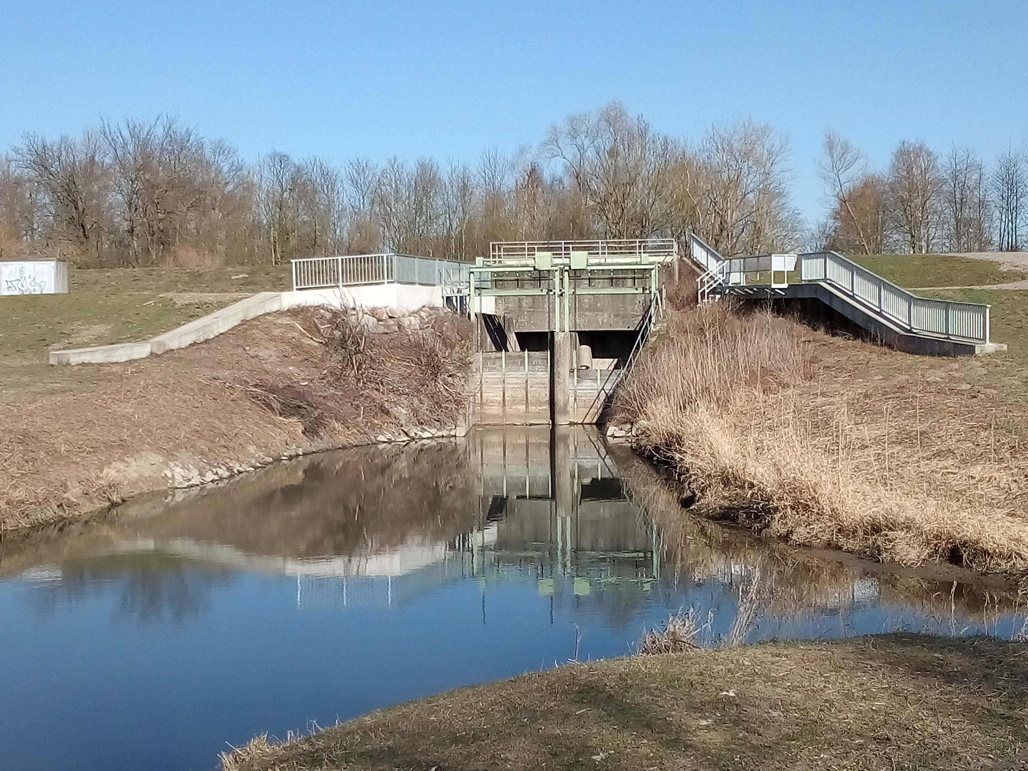 Düker des Rheinniederungskanals unter dem Saalbachkanal westlich von Rußheim